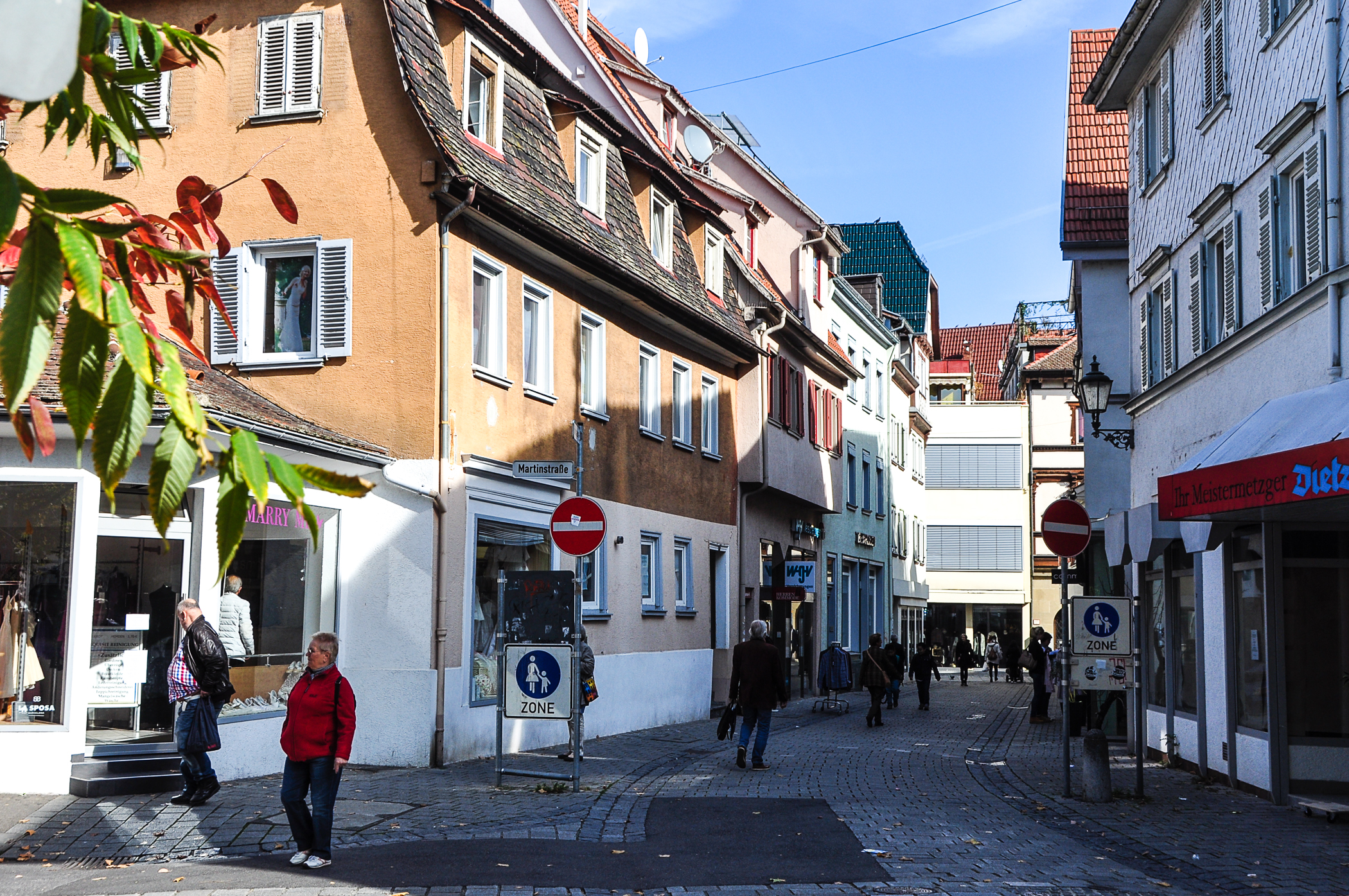 Blick durch die Ehnisgasse in Richtung Unterer Metzgerbach